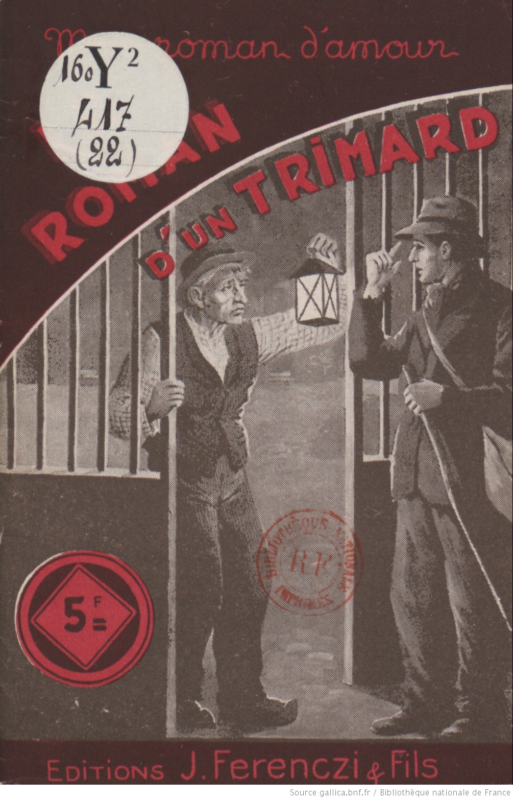 roman dramatique / par Gustave Gailhard (18..-1943)